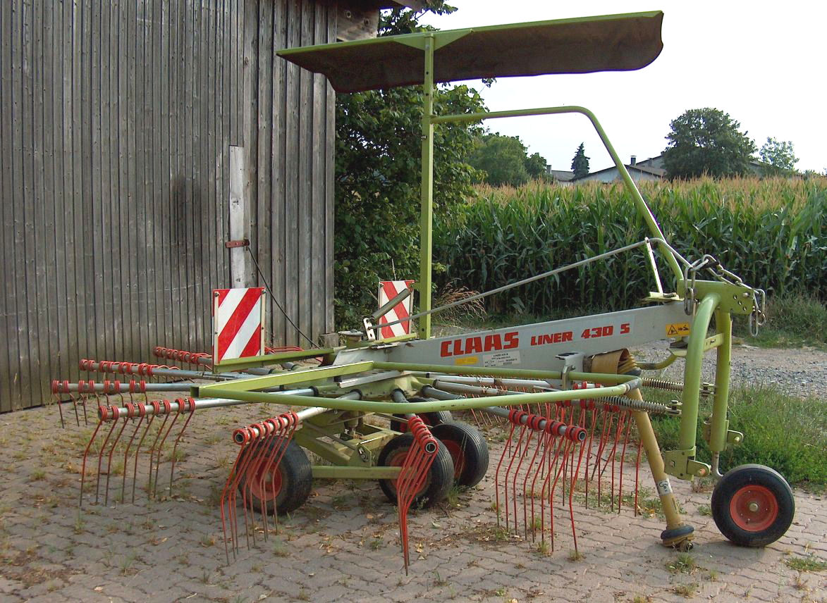 Einkreiselschwader (Heuschwader) Liner 430 S der Firma Claas mit einer Arbeitsbreite von 4,20 m